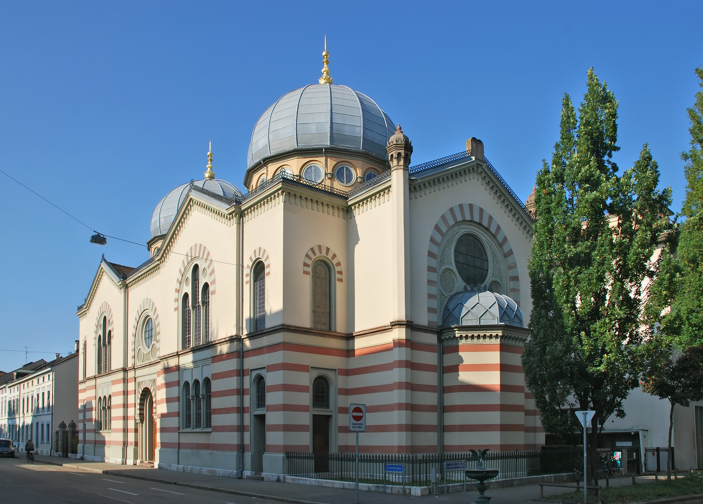 Basler Synagoge